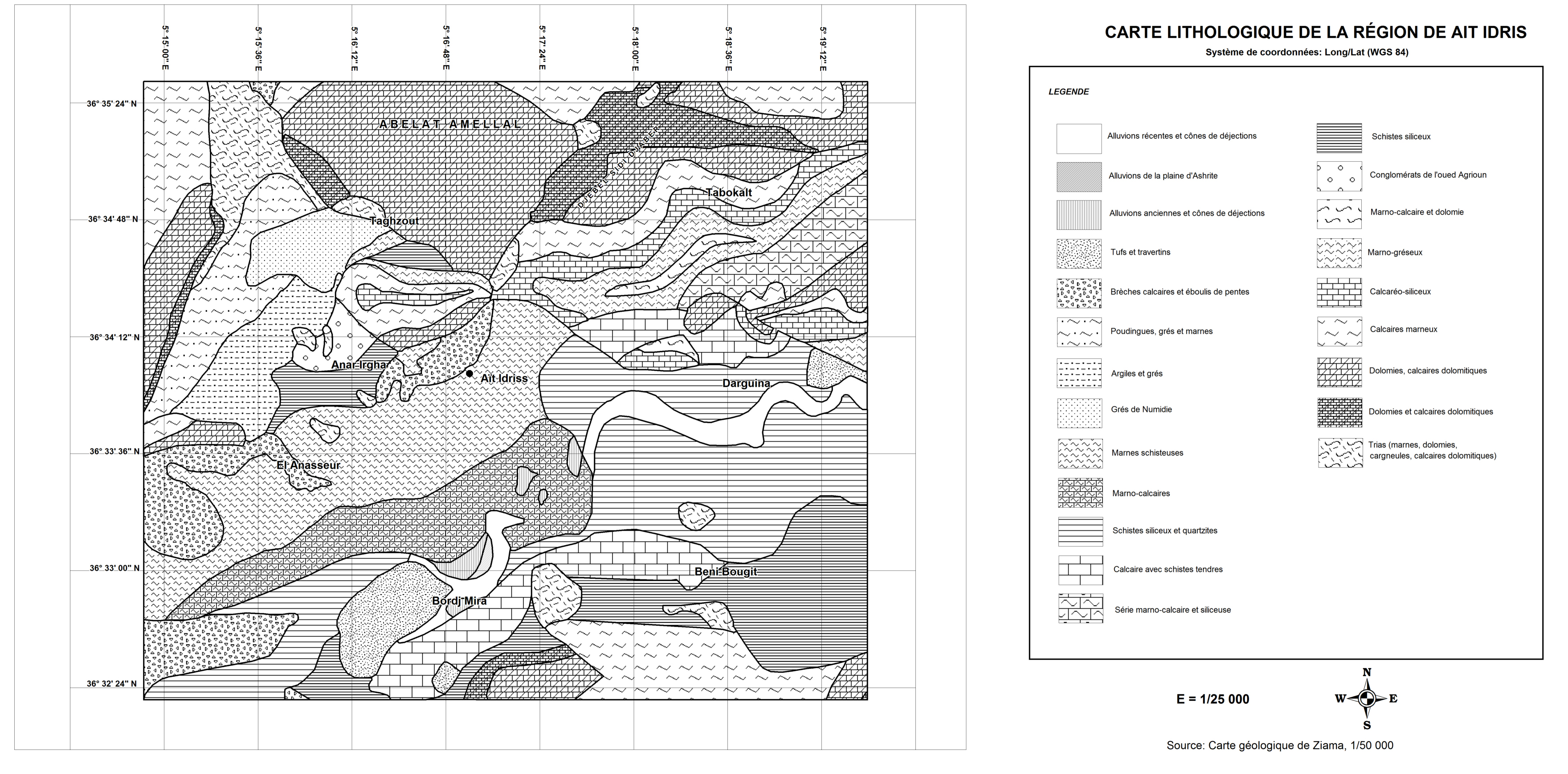 Carte lithologique de la région d'Ait Idris, Daïra de Darguina, Wilaya de Bejaïa (Algérie)